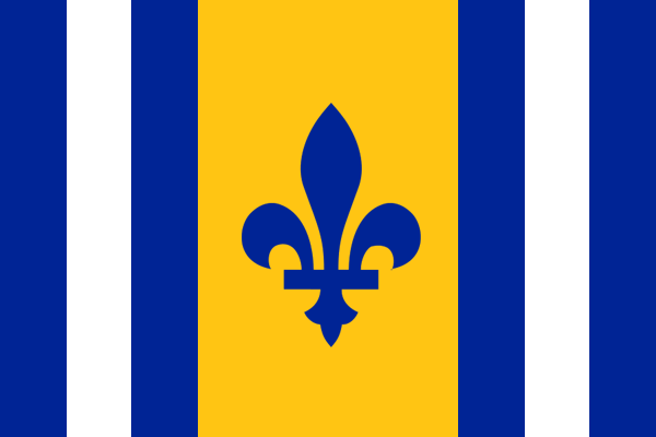 Drapeau de l'Ordre national du Québec